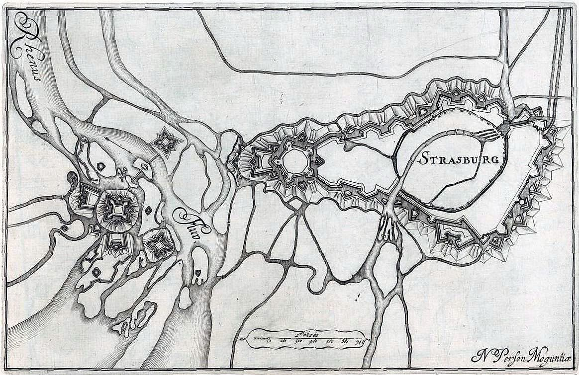 Festungsanlage von Strassburg 1692, errichtet durch Vauban nach der Eroberung der freien Reichsstadt Strassburg 1681 durch Ludwig XIV.